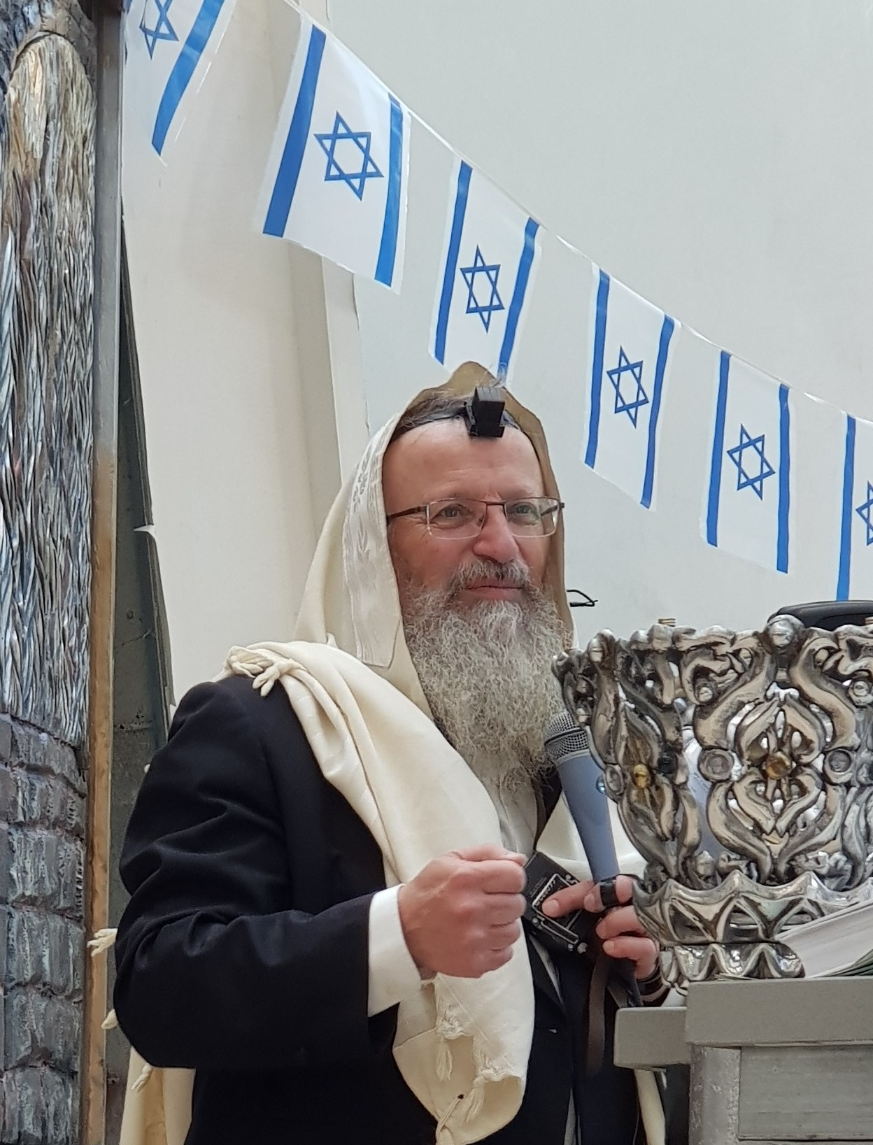 הרב בדרשת יום העצמאות התשע"ח בבית הכנסת היכל מנחמוב, תל אביב